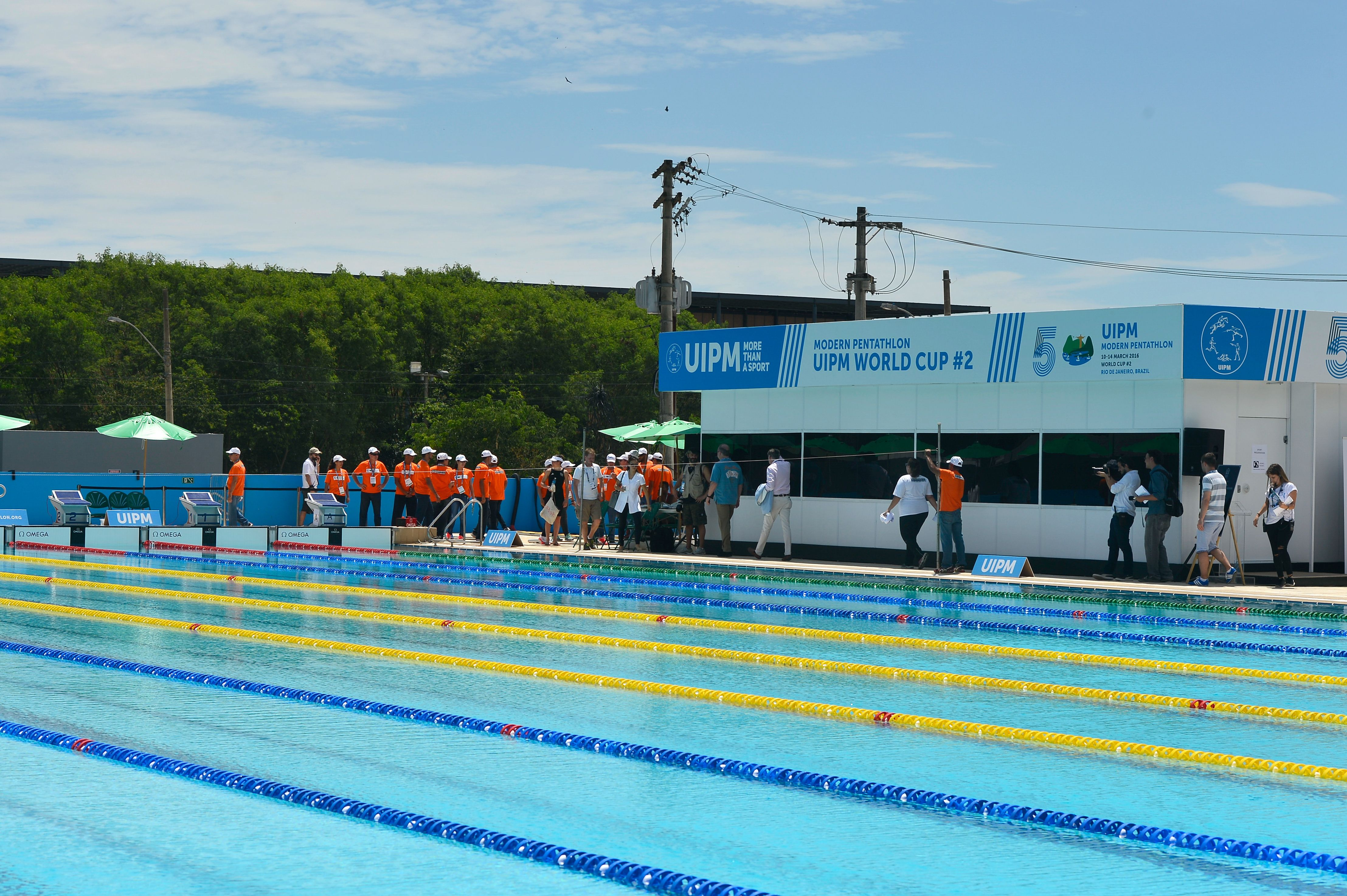 Centro Aquático do Complexo Esportivo de Deodoro